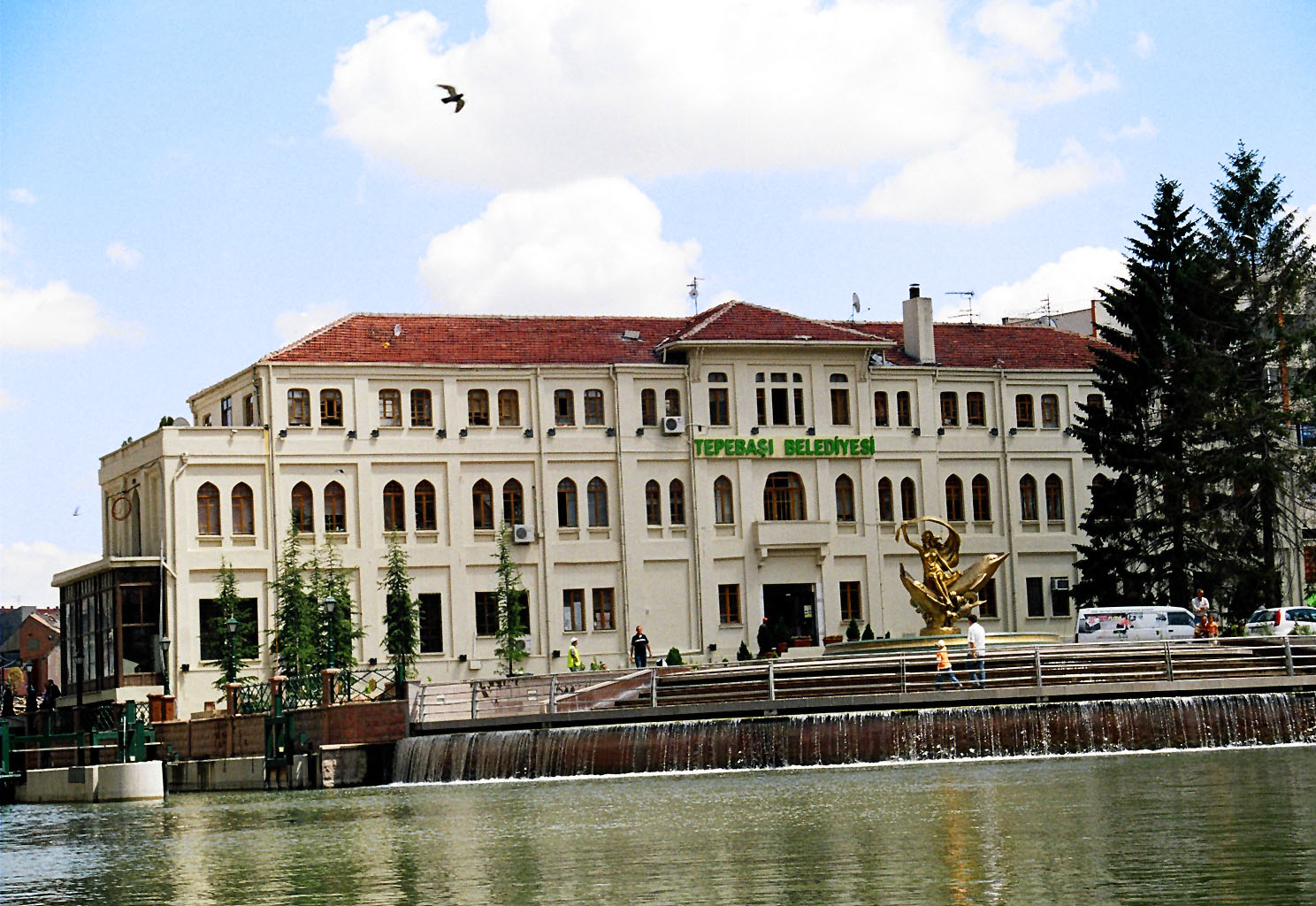 Photo By: Çağıl Adapınar Eskisehir Tepebasi Belediye Binası (Tepebaşı Municipality Building, Eskişehir, Turkey)